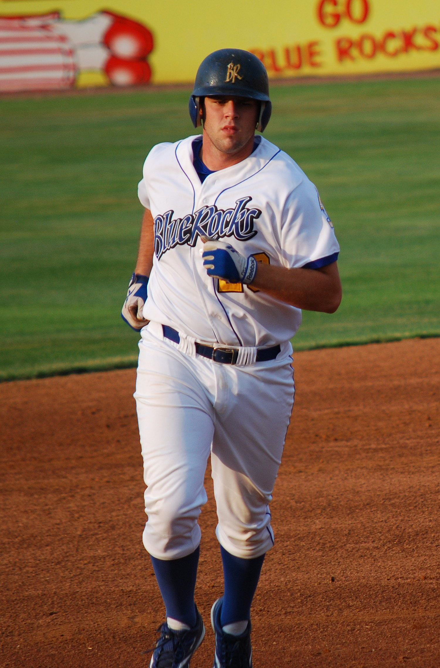 Mike Moustakas